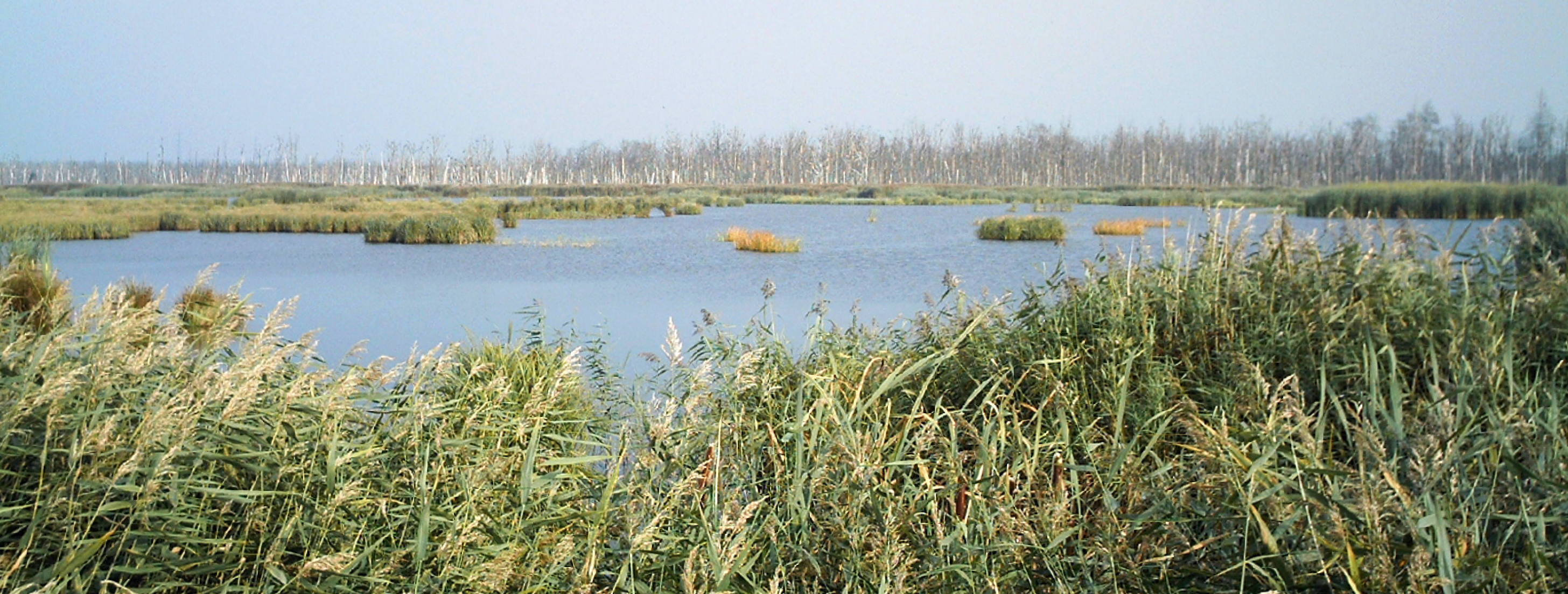 Anklamer Torfmoor, Naturschutzgebiet Anklamer Stadtbruch